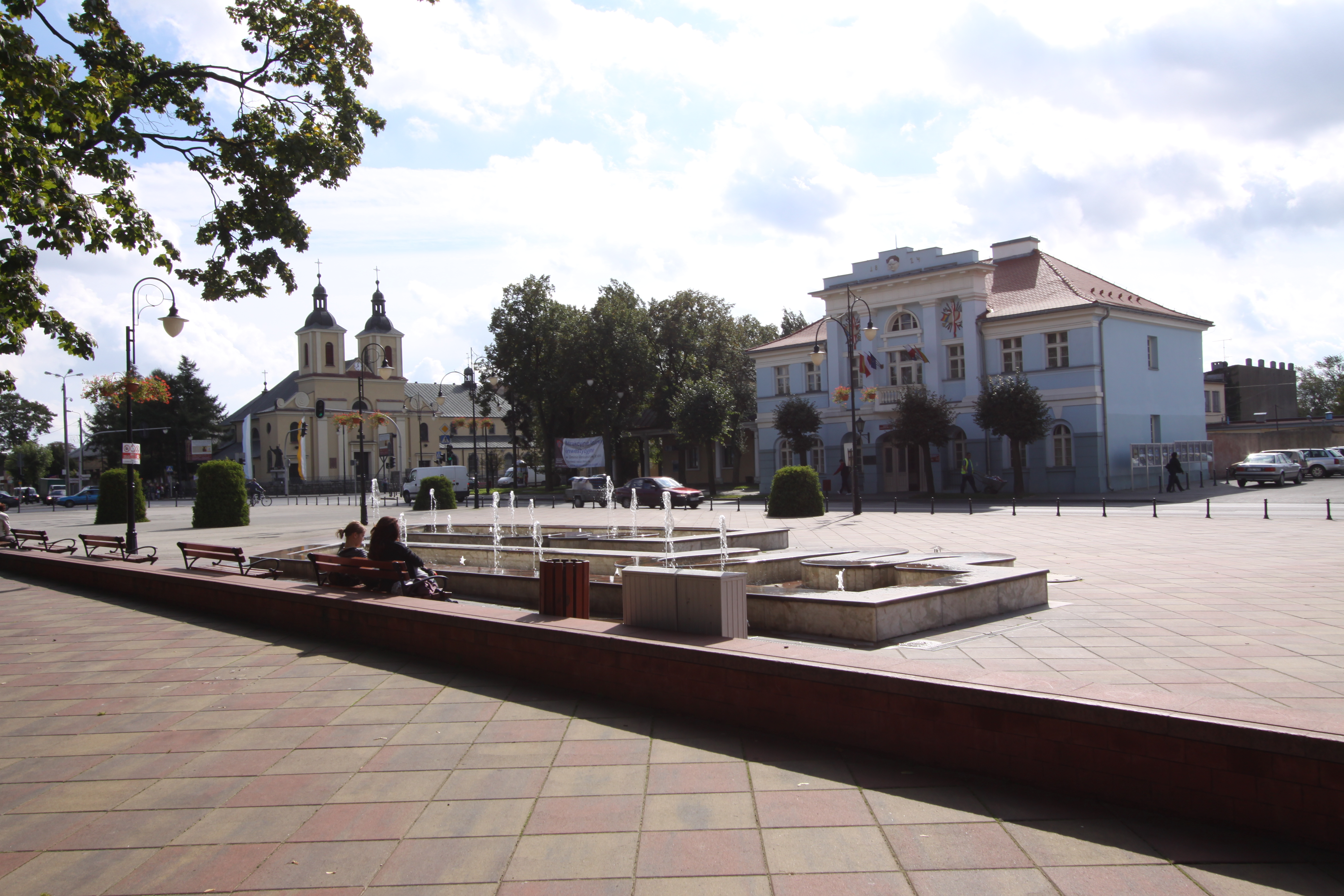 Aleksandrów Łódzki, zespół przestrzenno-architektoniczny Rynku, pocz. XIX